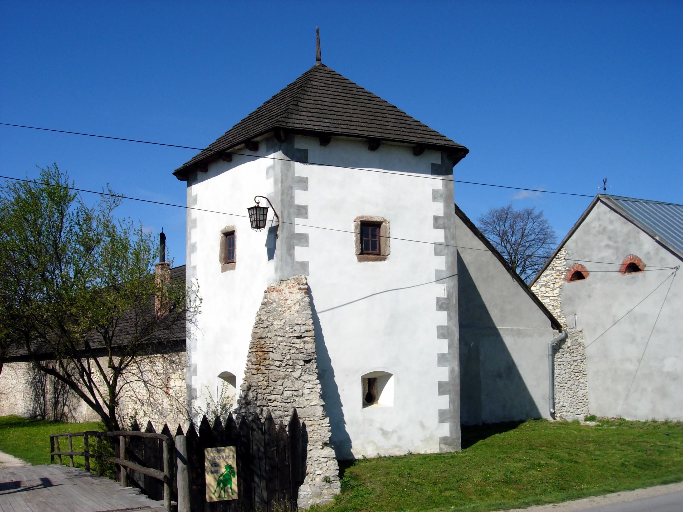 Fortalicja Sobkowskich w Sobkowie